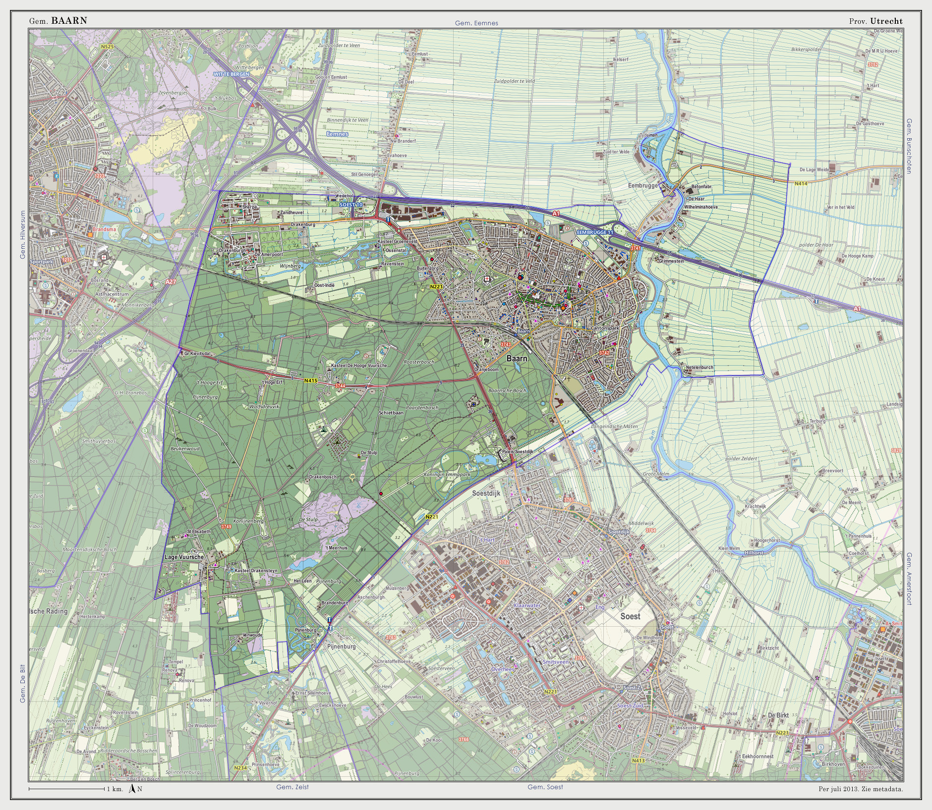 Topografische kaart van gemeente Baarn (2013). Samengesteld door user:janwillemvanaalst op basis van de GML open geodata van de BRT/Top10NL (basisregistratie Topografie, Kadaster 2011), vrijgegeven door Kadaster onder de Creative Commons BY licentie. Additionele gegevens uit BAG (8 juli 2013), uit de Open Street Map (9 juli 2013) en uit de Risicokaart. Peildatum kaartbeeld: 9 juli 2013. Samenstelling en kleurenschema: Jan-Willem van Aalst, met QuantumGIS en Photoshop. Zie ook de Legenda.